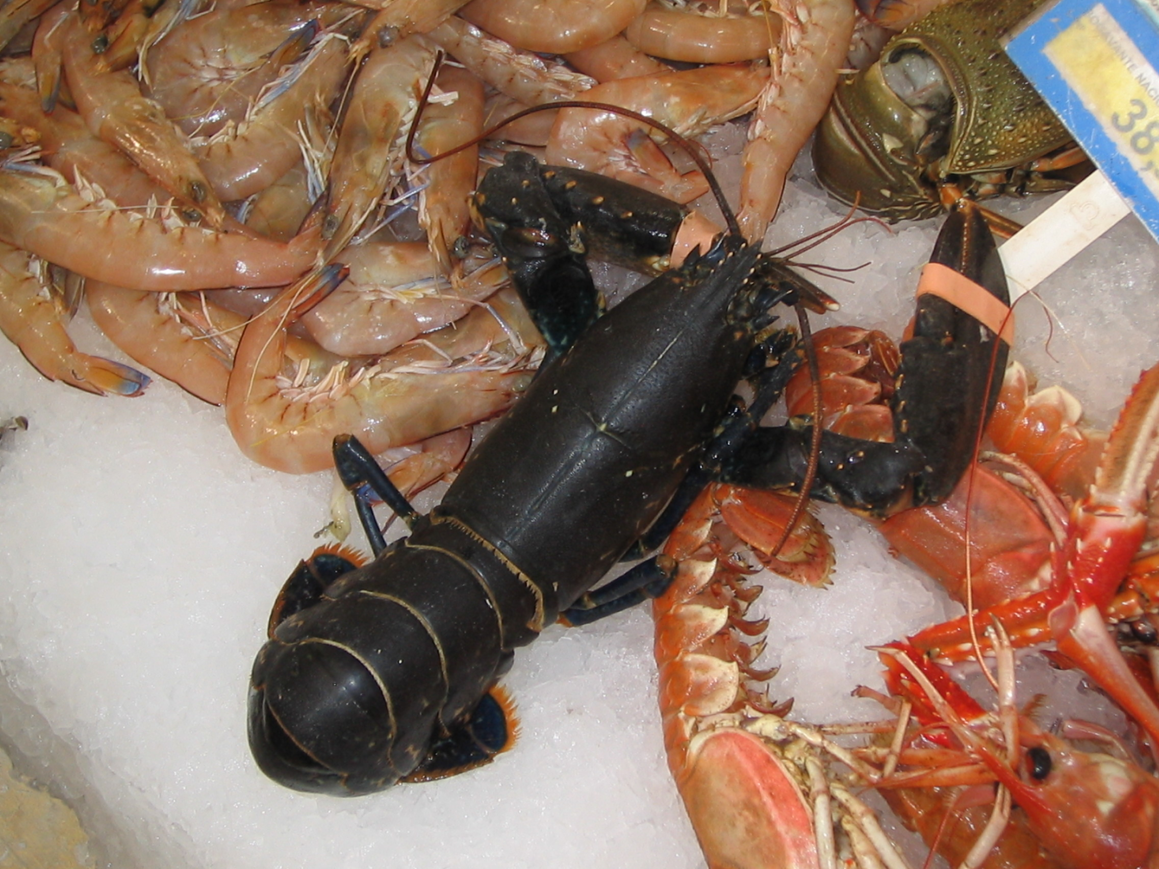 A lobster